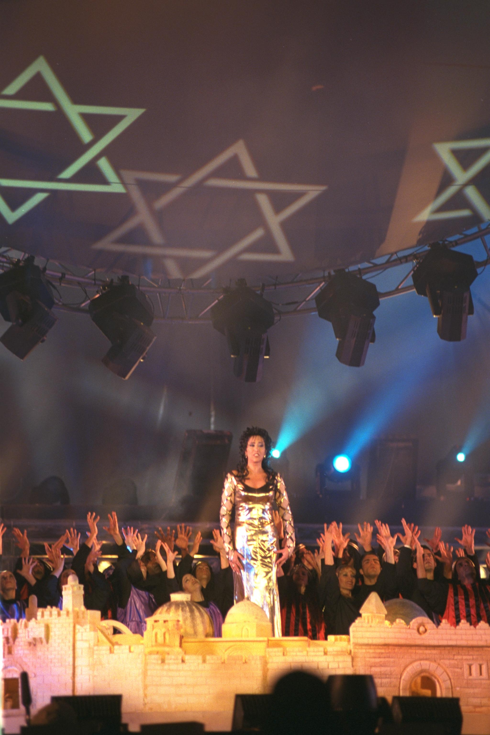 SINGER OFRA HAZA AT THE JUBILEE CHIMES PERFORMANCE AT GIVAT RAM, JERUSALEM, IN HONOR OF THE 50TH INDEPENDENCE DAY OF THE STATE OF ISRAEL. הזמרת עופרה חזה מופיעה בחגיגות היובל בגבעת רם, ירושלים, לכבוד יום העצמאות ה-50 של מדינת ישראל Photo: AMOS BEN GERSHOM, 04/30/1998